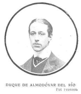 Retrato del Duque de Almodóvar del Río, obra de Christian Franzen, recogido en la revista española Actualidades.